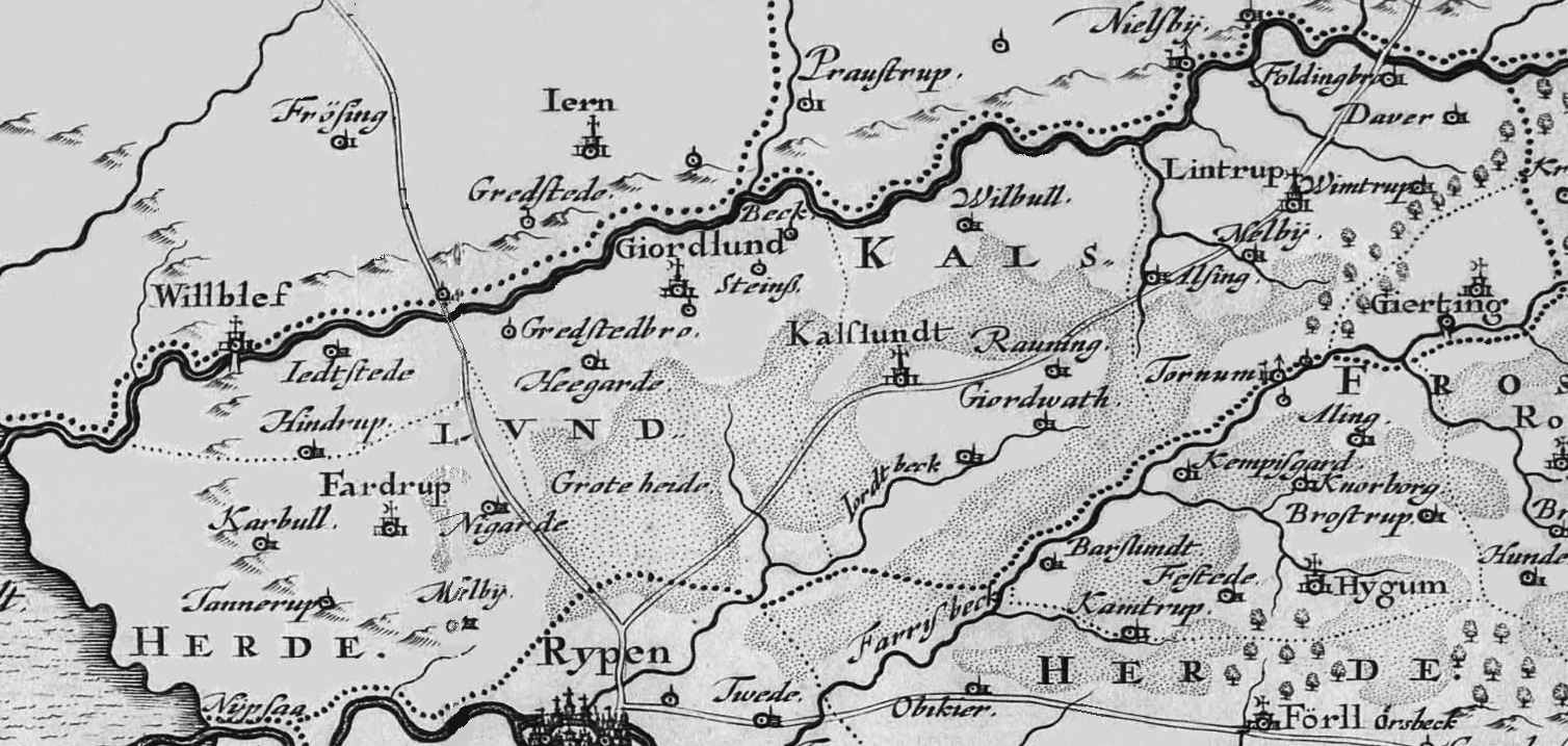 Kalvslund herred